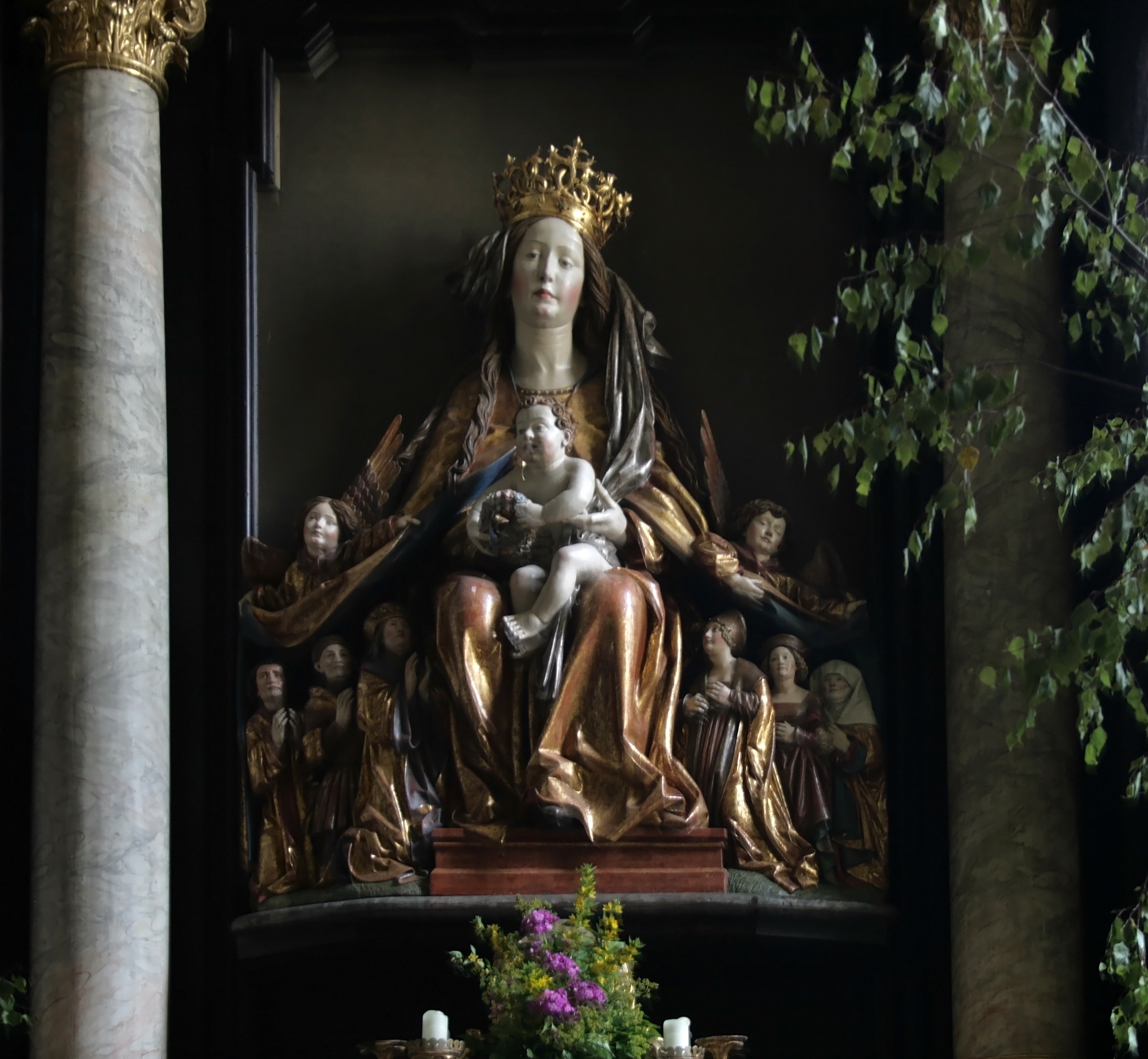 Die Gregor Erhart zugeschriebene Schutzmantelmadonna am Hochaltar der Wallfahrtskirche Frauenstein (nach 1510)